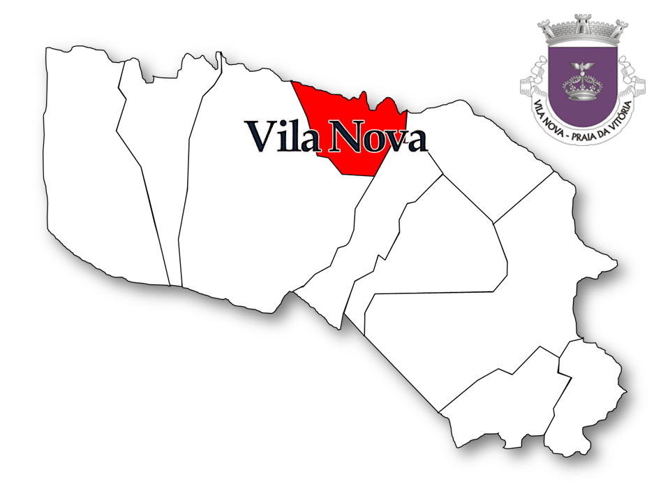 Freguesia